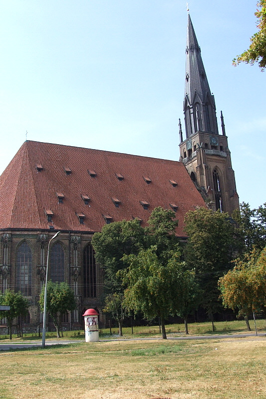 Chojna Marienkirche Fotograf: Harald Rossa Datum: July 2006 Höher aufgelöste Version ist verfügbar